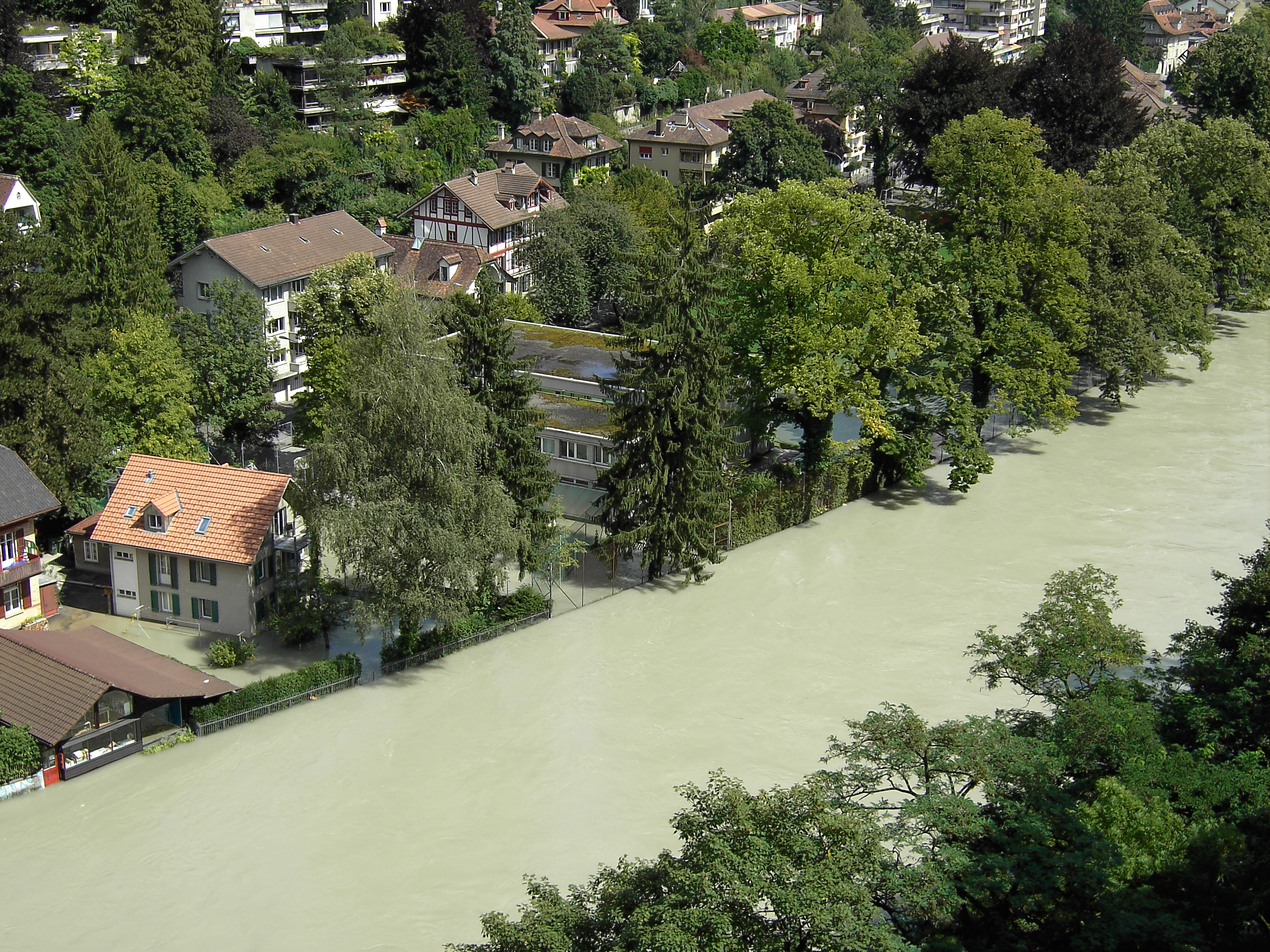 Bern 2005, das Hochwasser (das Altenberg Quartier von der Kornhausbrücke aufgenommen).